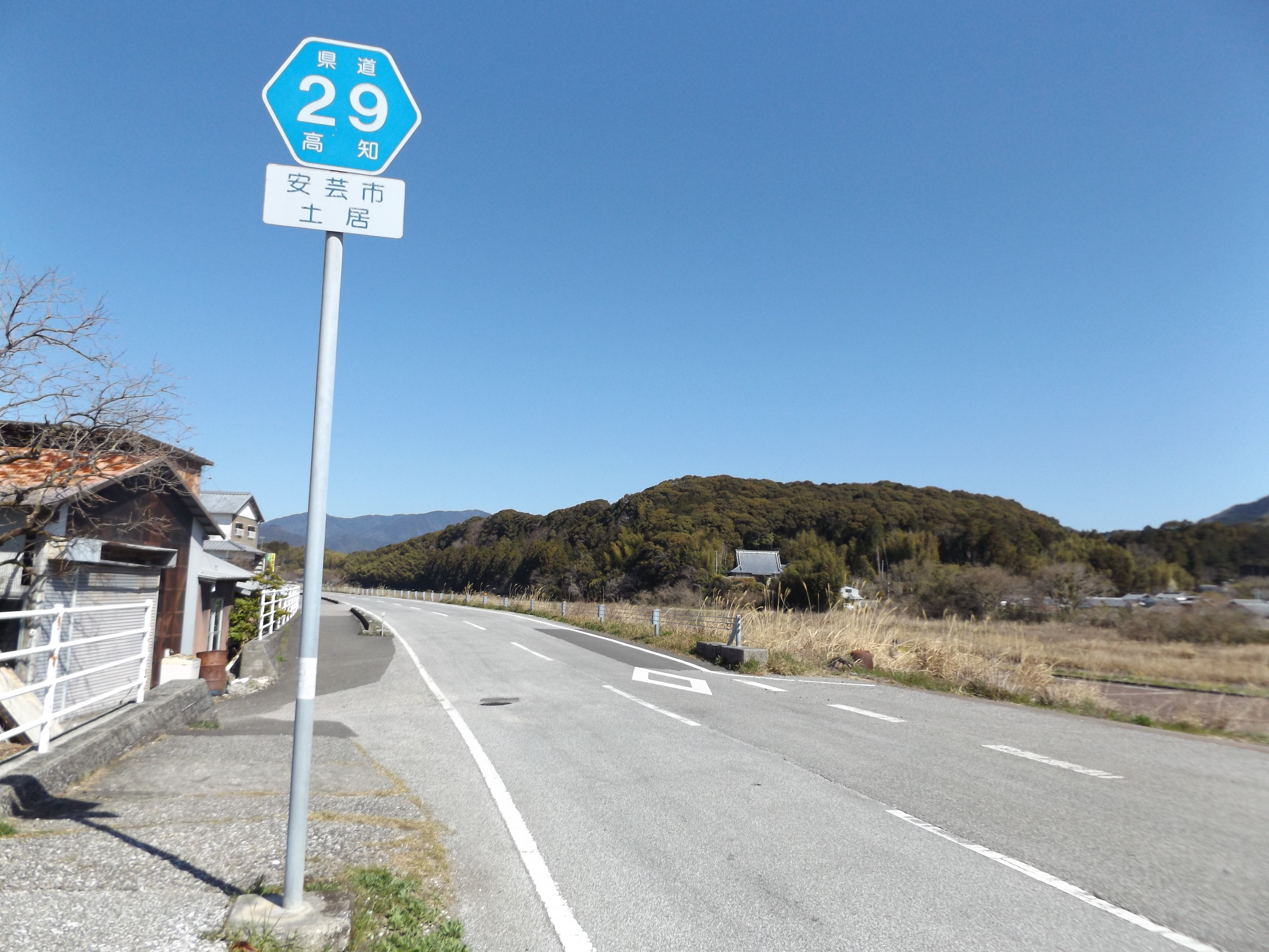 高知県安芸市を安芸川に沿って通る高知県道29号安芸物部線。撮影地点近くには安芸城跡がある。